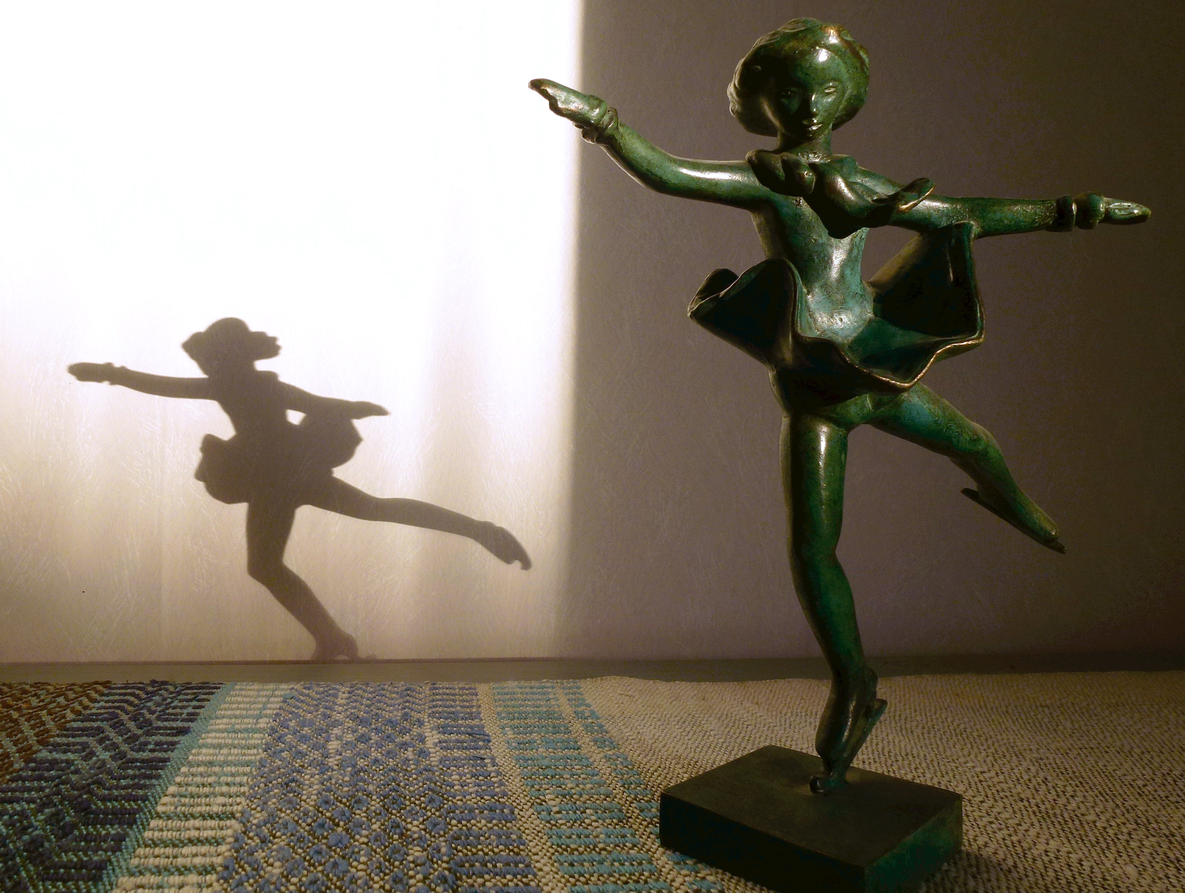 Carl Milles Skridskoprinsessan statyett